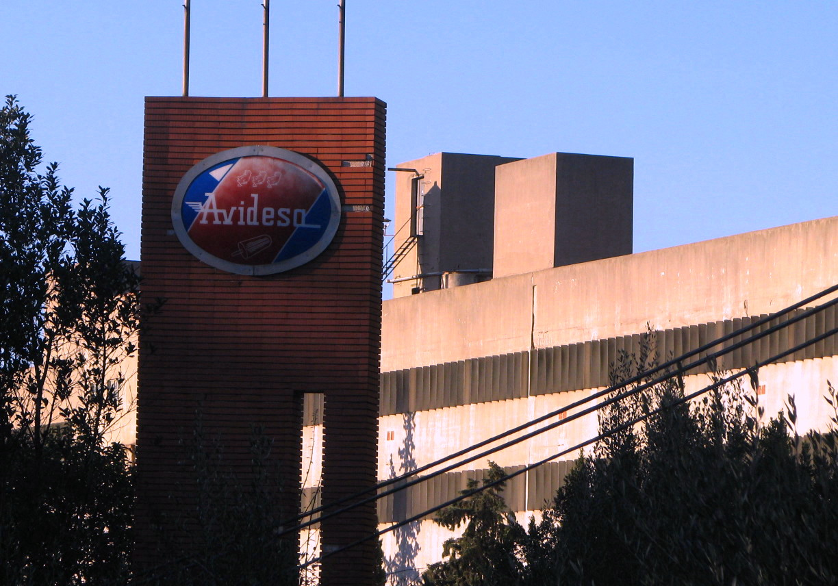 Antigua factoria y emblema de Avidesa, en Alzira (Valencia)